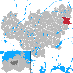 Altkalen in Mecklenburg-Vorpommern - District Güstrow